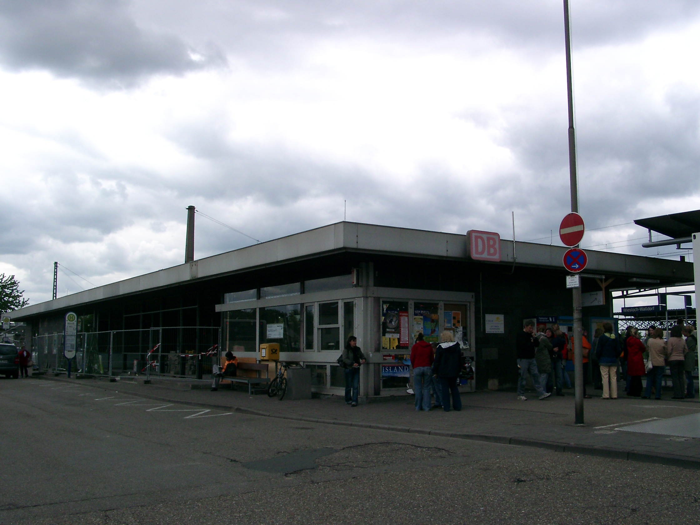 Gemeinsamer Bahnhof der Städte Walldorf (Baden) und Wiesloch